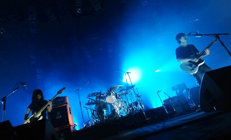 3ピースバンド